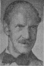 Arvid Huss